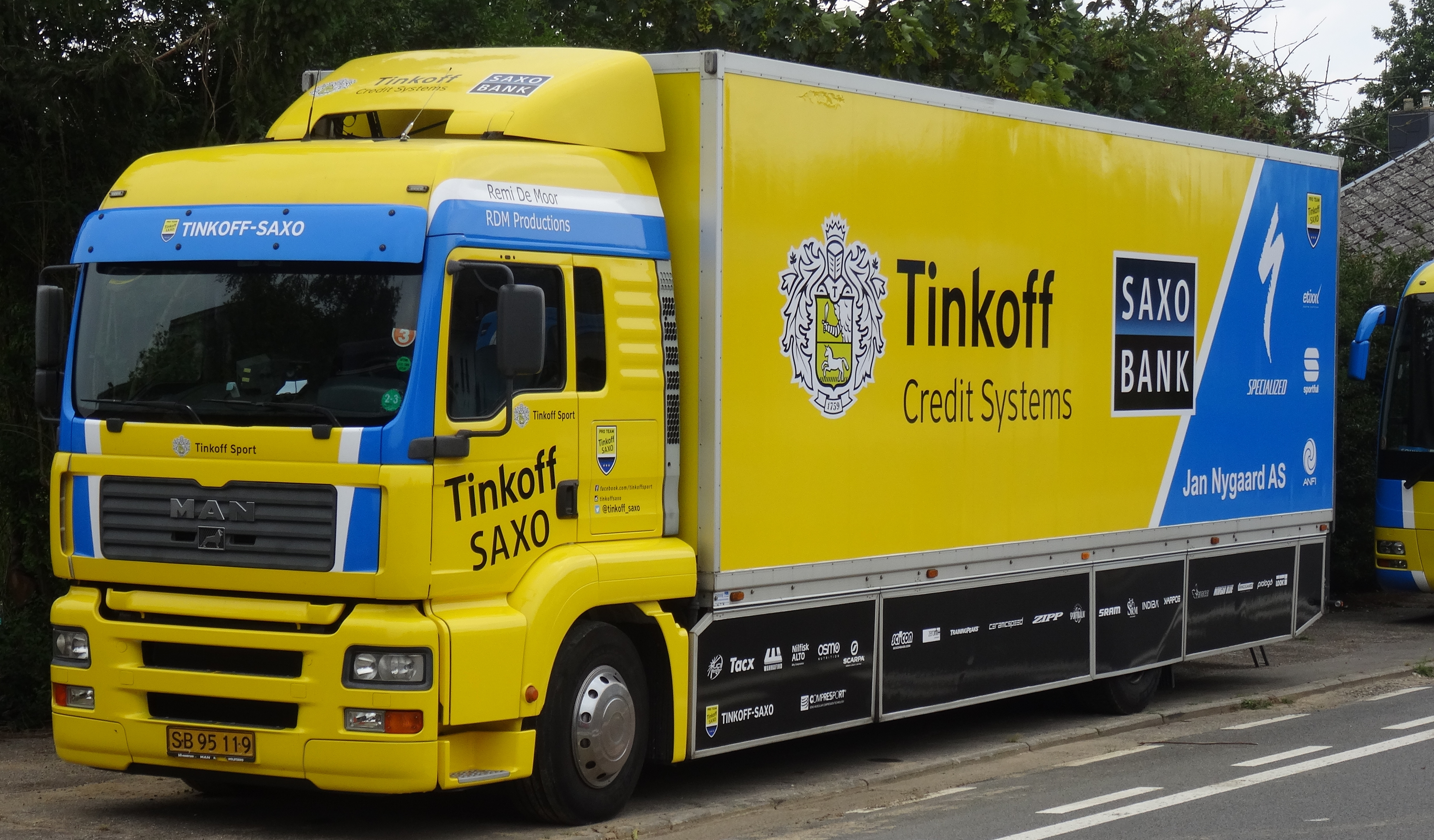 Reportage photographique réalisé le mercredi 30 juillet à l'occasion de l'arrivée de la cinquième et dernière étape du Tour de Wallonie 2014 à Alleur (Ans), Belgique.